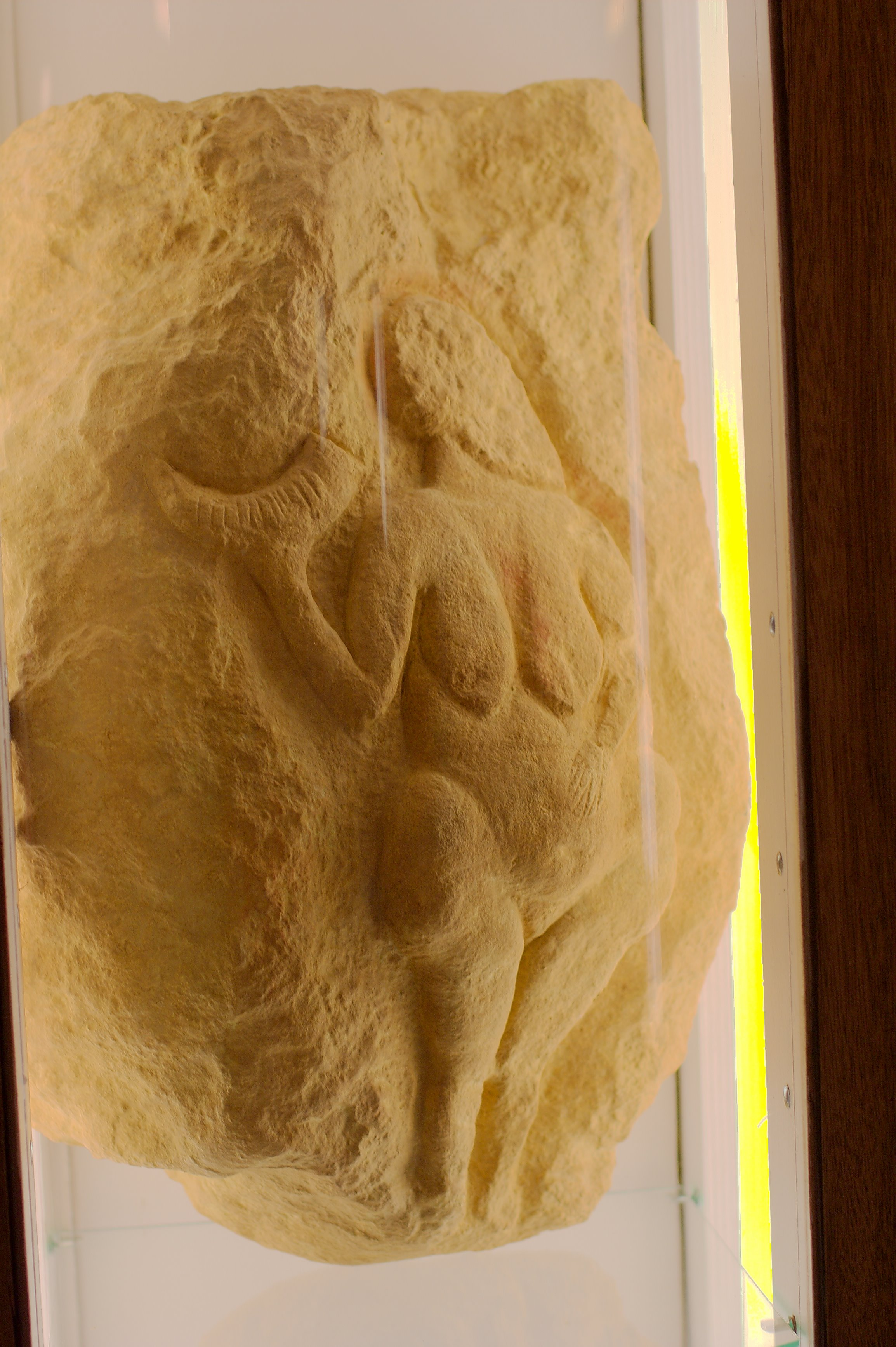 Venus figurine Laussel